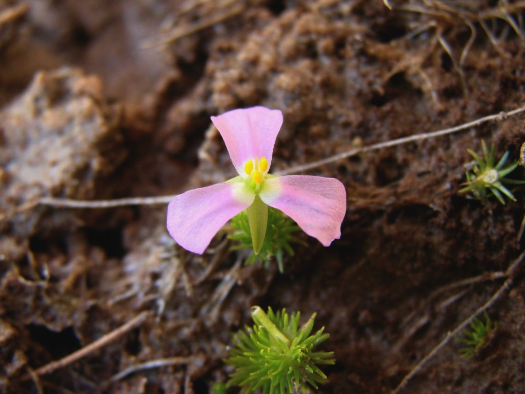 Mayaca fluviatilis - MAYACACEAE Parque Nacional Grande Sertão Veredas - Chapada Gaúcha - Minas Gerais - Brasil.